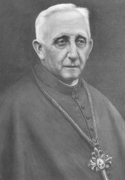 Josef Kreisinger (1857 - 1934), Český katolický kněz.